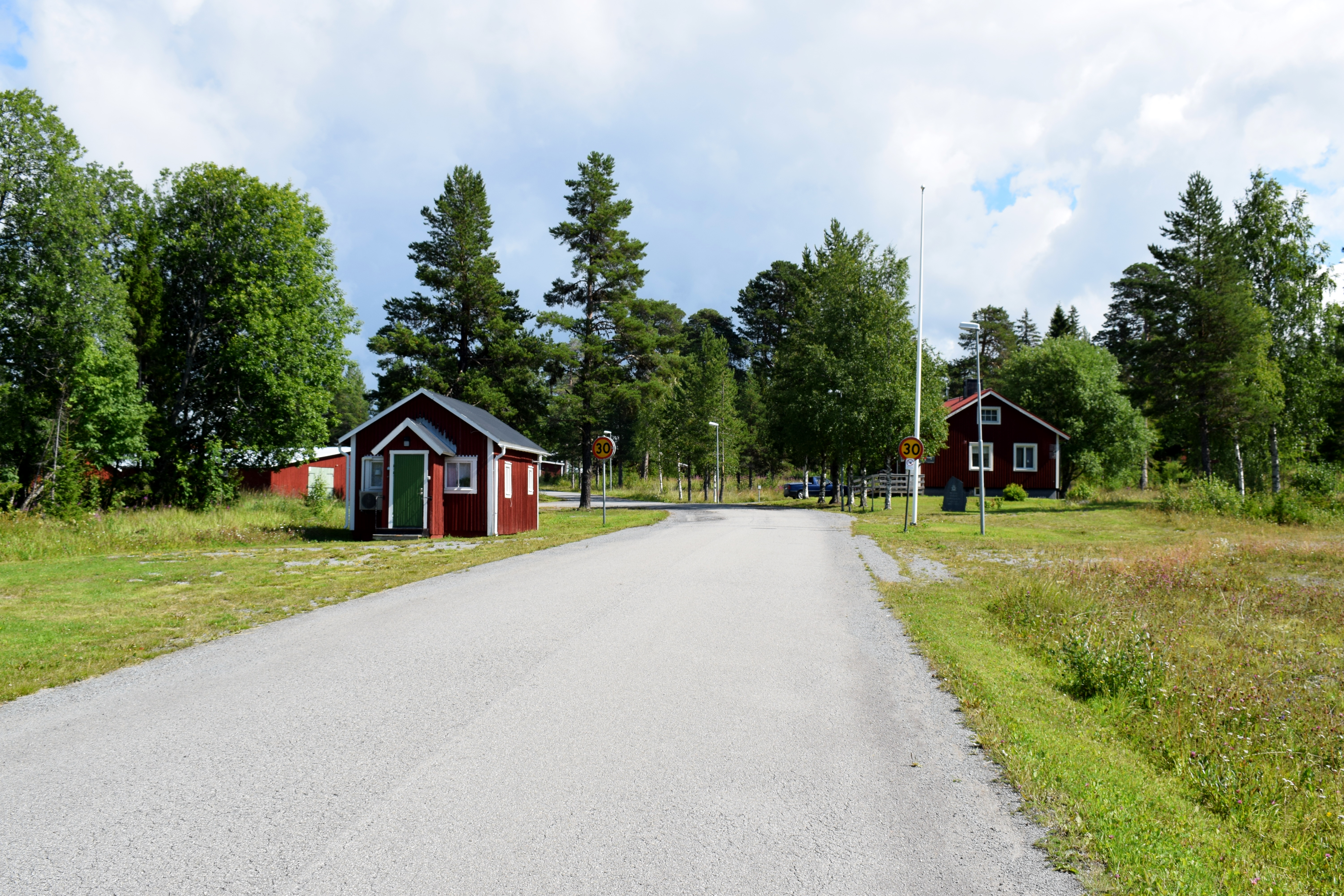 Infarten till lägret i Grytans skjutfält